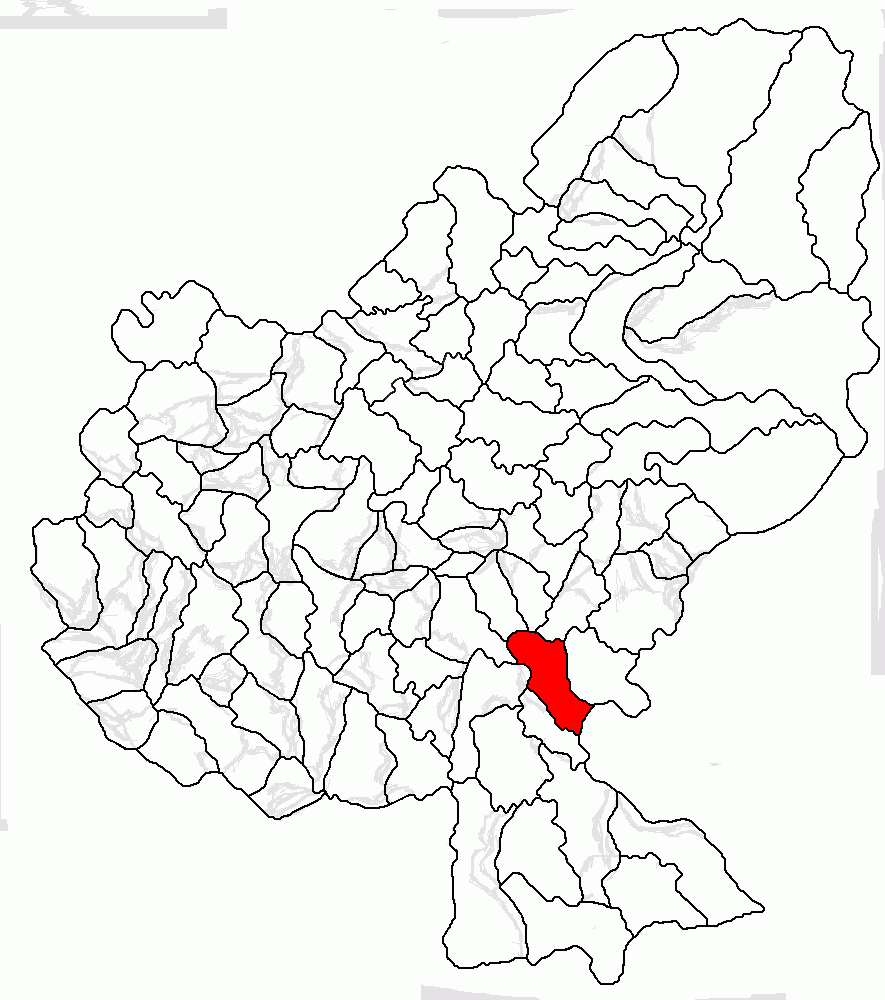 Categorie:Hărţi ale judeţului Mureş